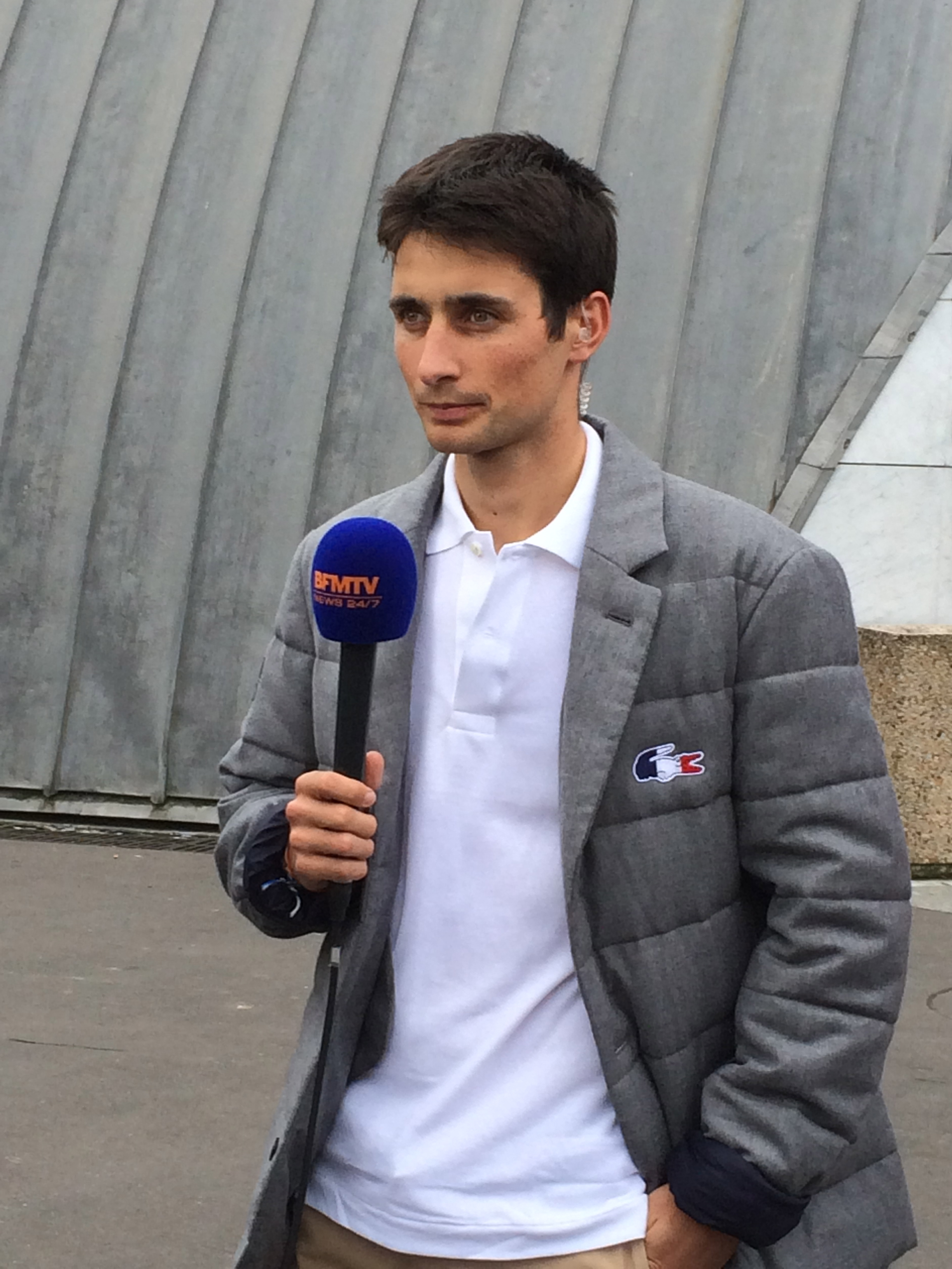 Nordic combined world and olympic champion Jason Lamy-Chappuis in Paris, october 14th 2013